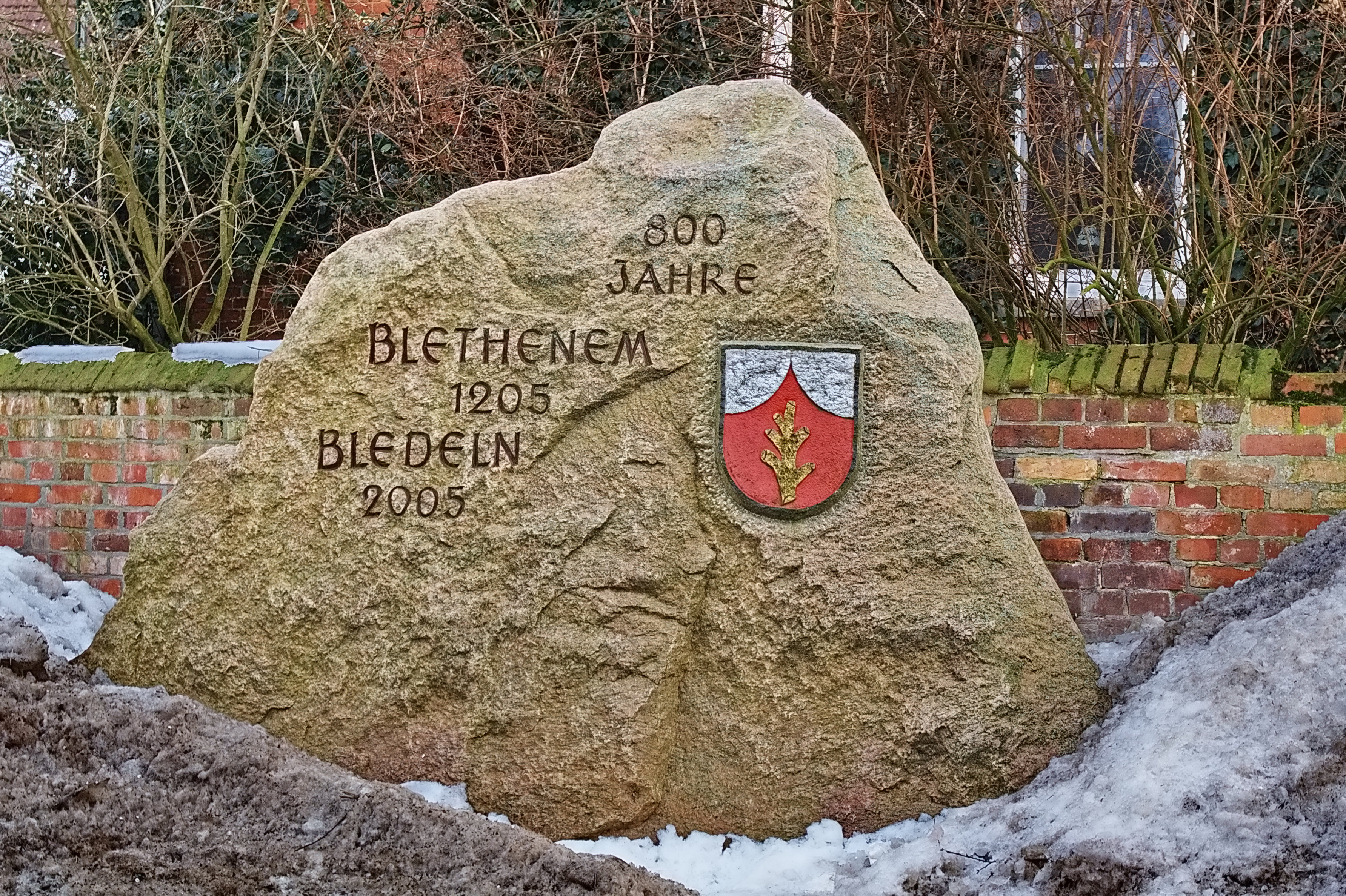 Gedenkstein 800 Jahre Bledeln (Algermissen), Niedersachsen, Deutschland